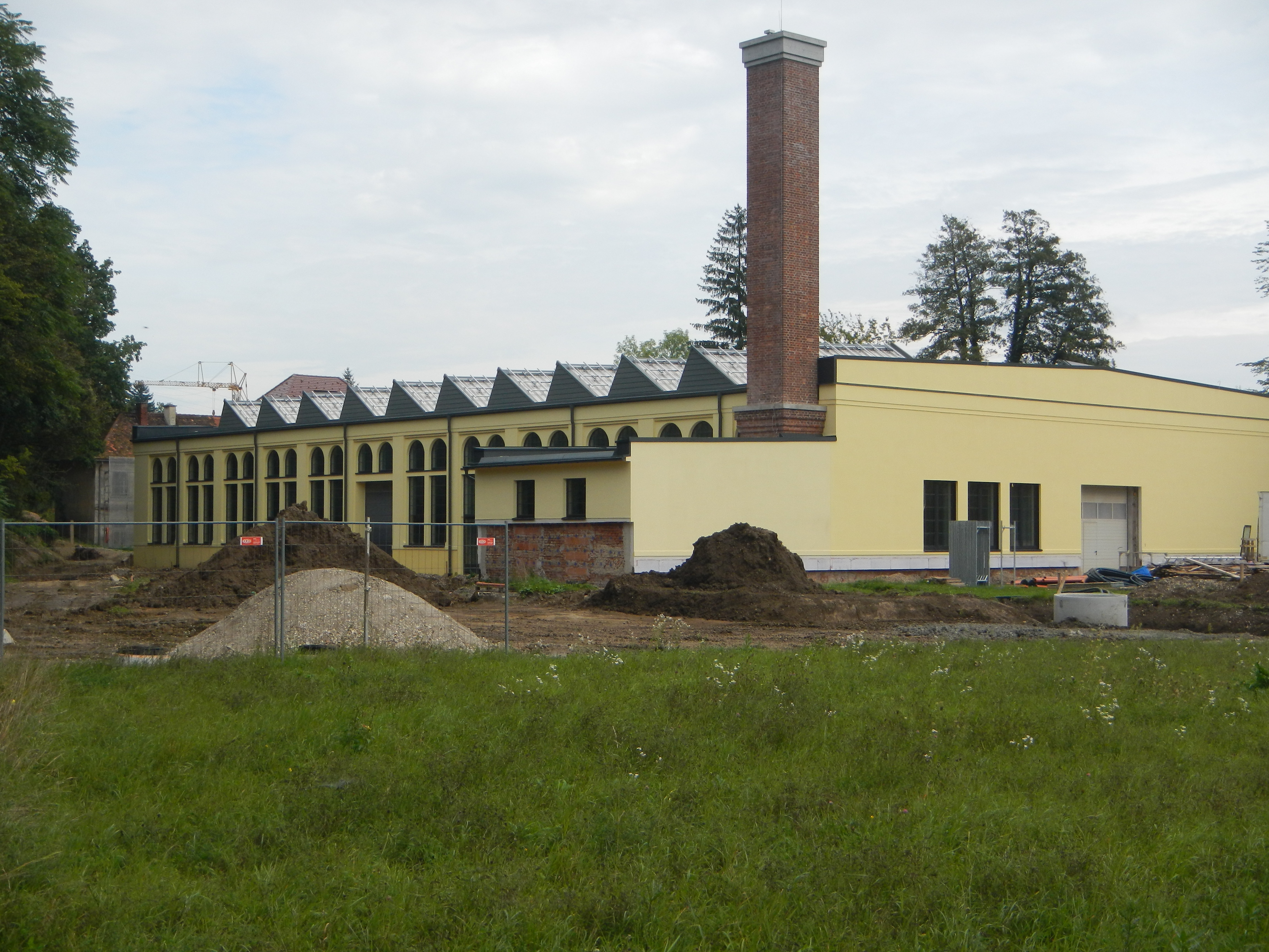 Spitzenfabrik Viehofen, Renovierung